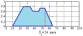 рис6